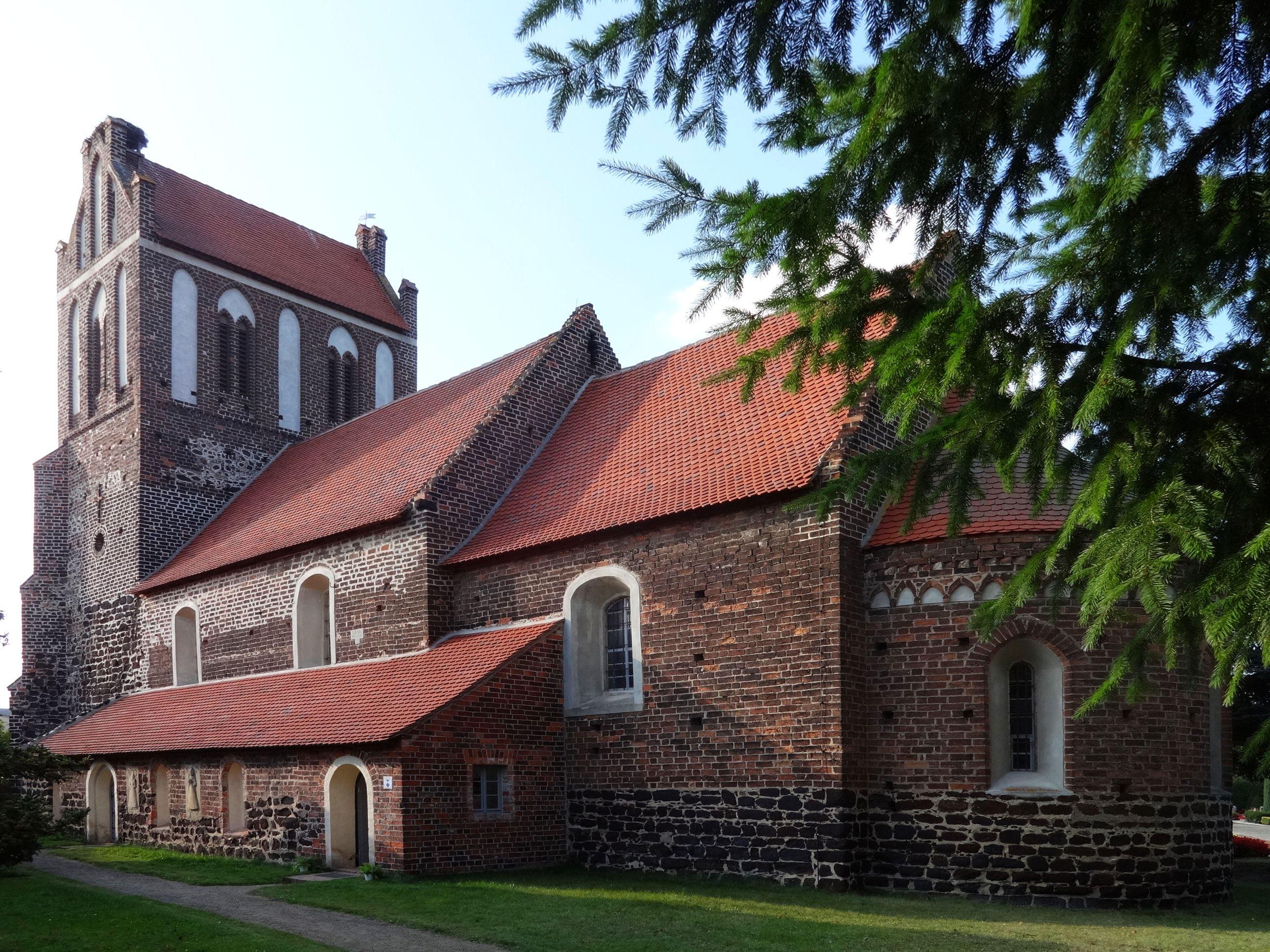 Blick von Süd-Osten auf die Dorfkiche in Schönborn-Lindena